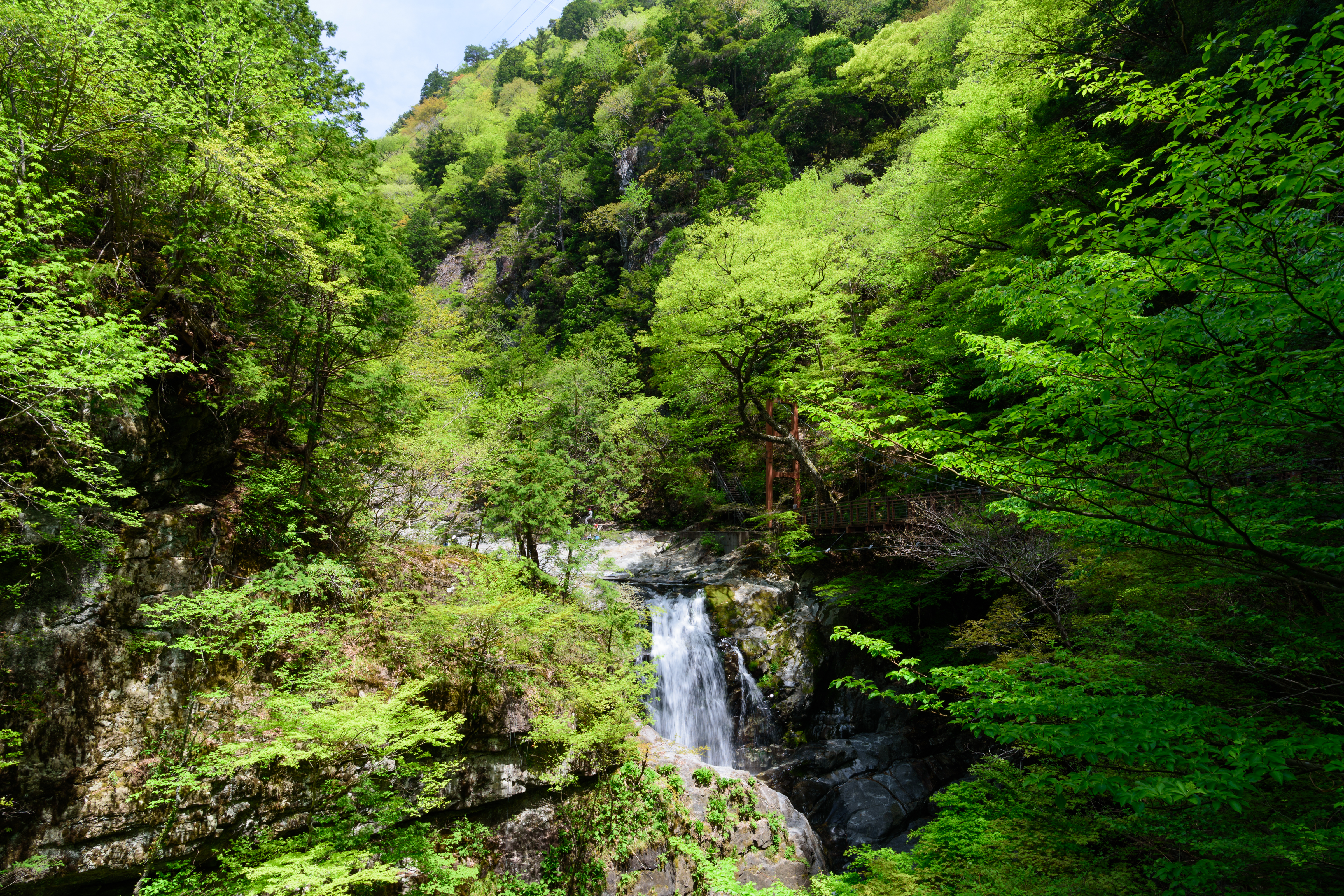 みたらい渓谷みたらい滝付近